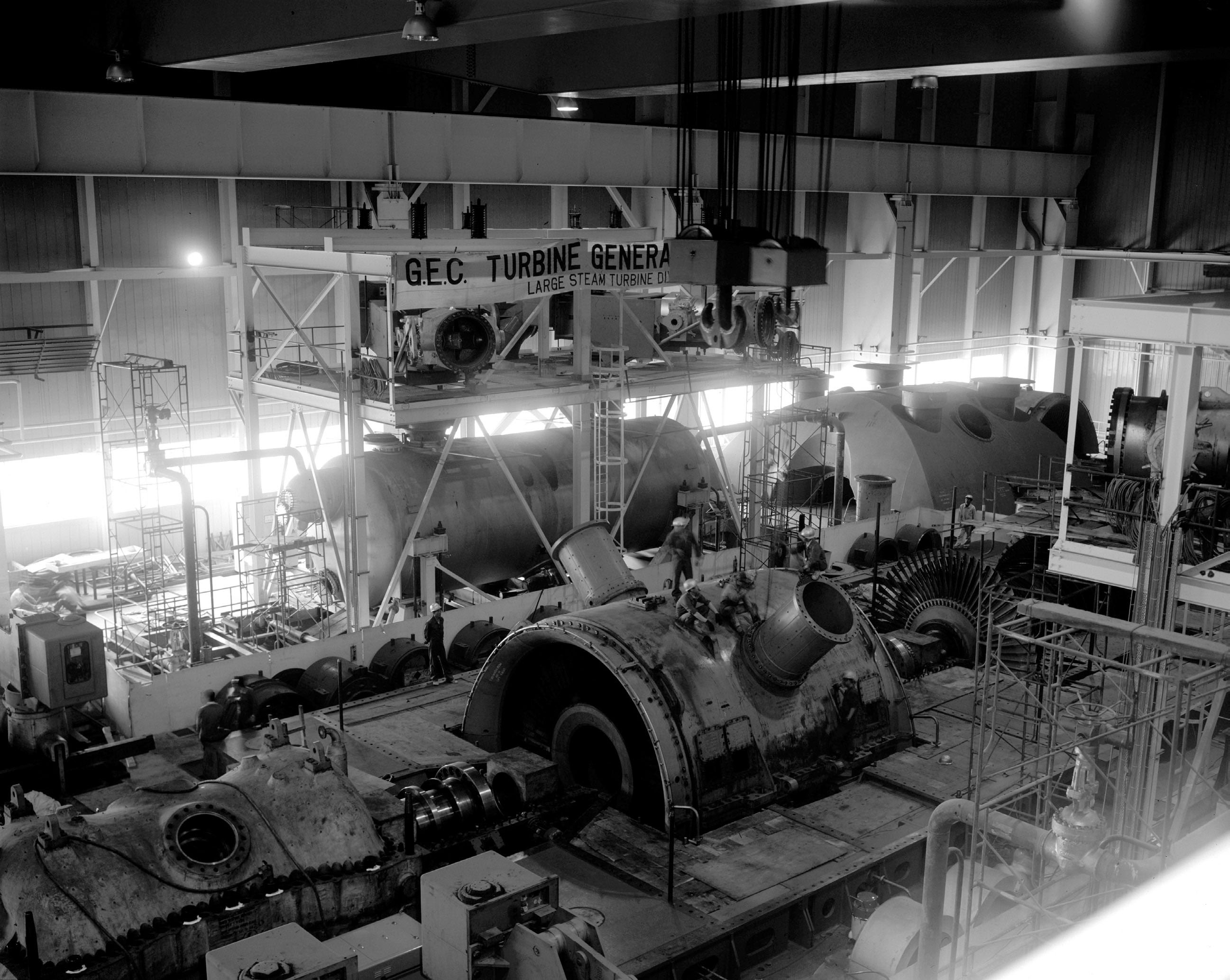 촬영일 : 1976년 06월 14일 촬영장소 : 대한민국 경남 양산군(현재는 부산광역시 기장군) 고리원자력발전소 참석자 : 없음 관련내용 : 경남 양산 고리원자력발전소의 터빈